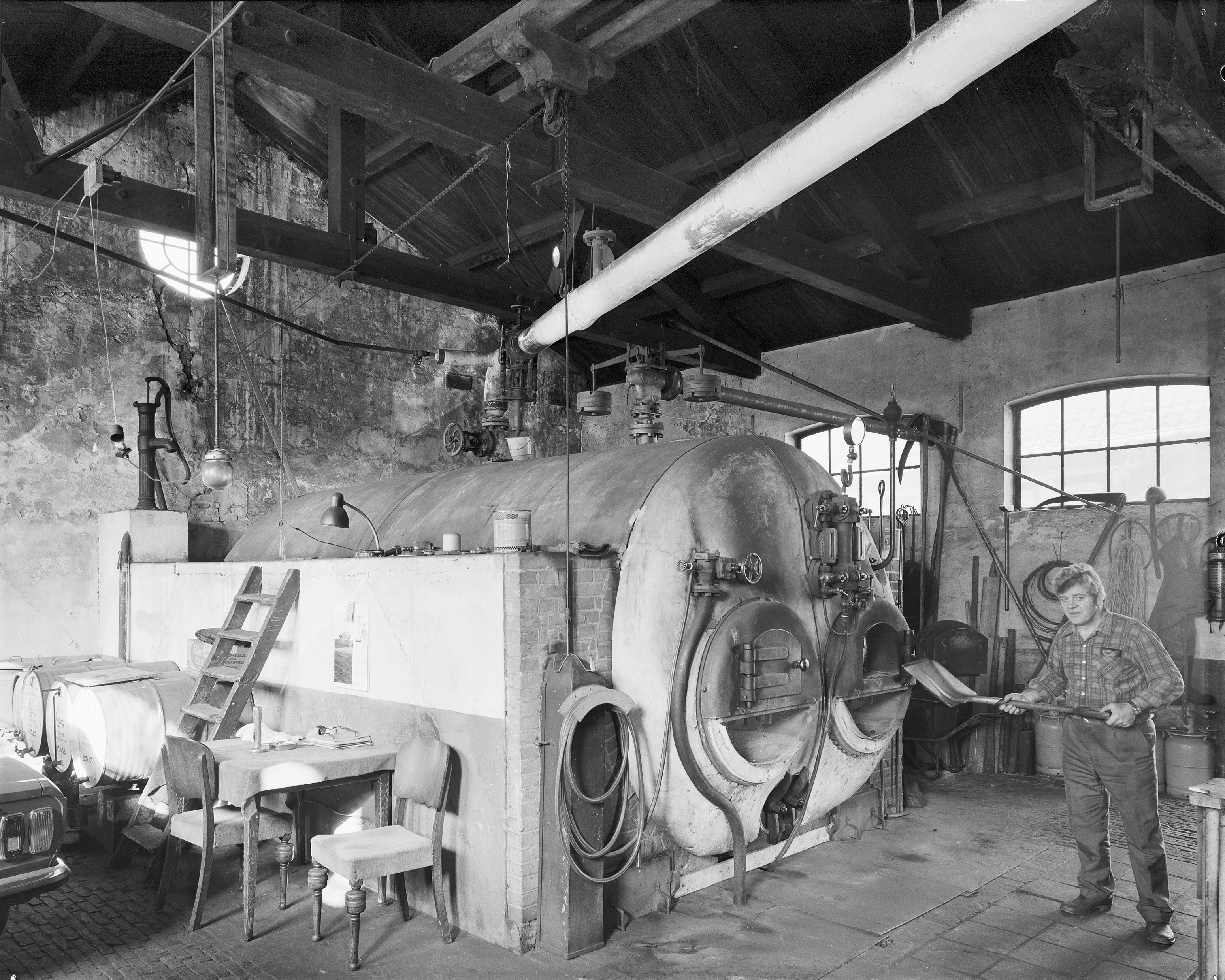 Stoomgemaal van de polder Arkemheim: ketelruimte